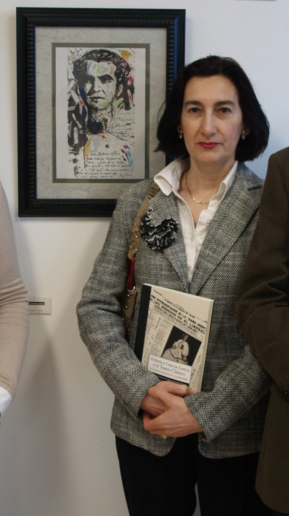 Isabel Lizarraga Vizcarra.